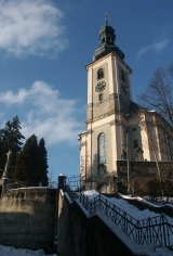 Kostel sv. Máří Magdaleny v Krásné Lípě (PSČ 407 46)